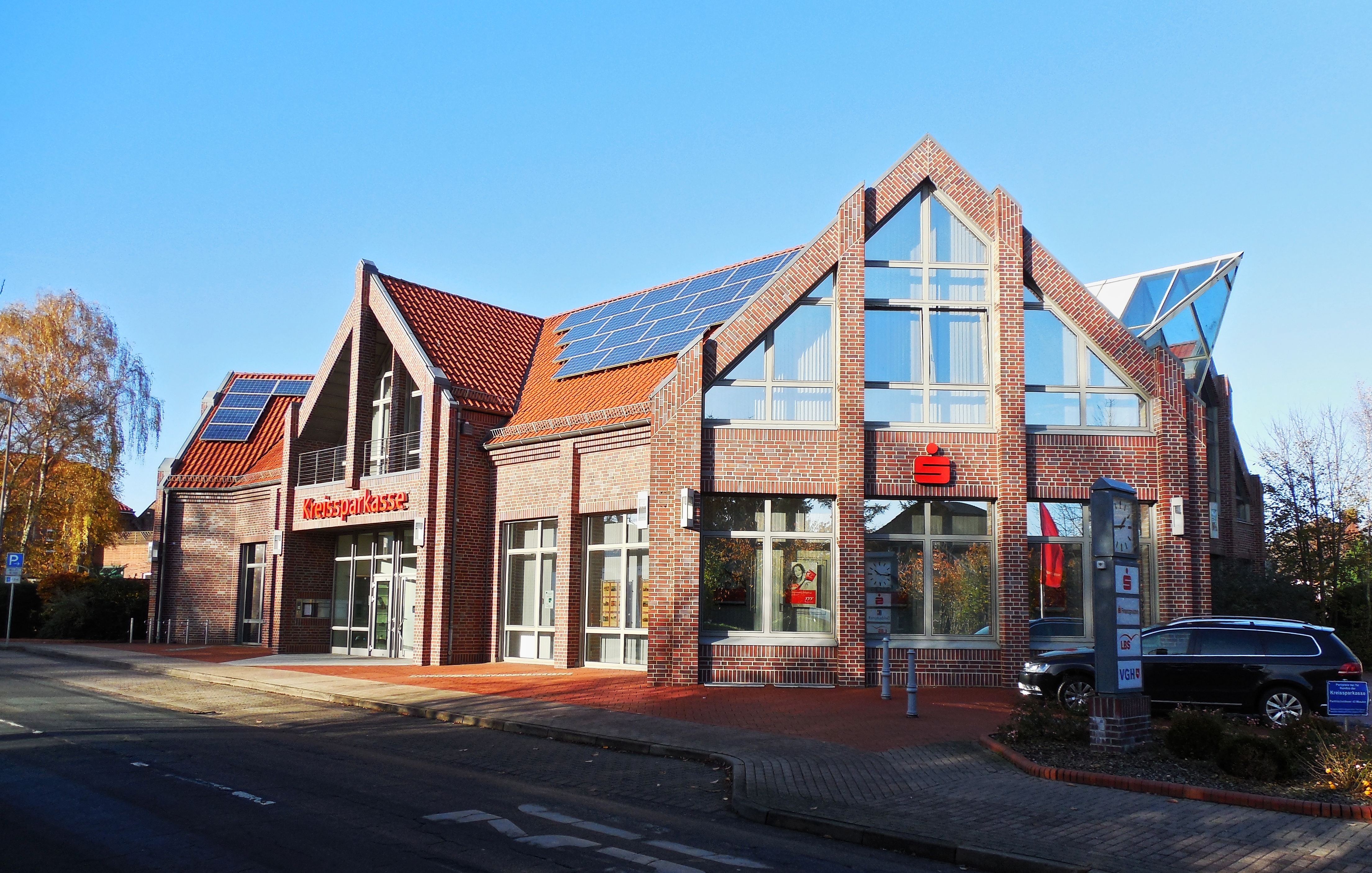 Kreissparkasse